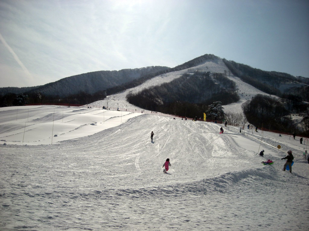 斑尾高原スキー場。2010年2月撮影。